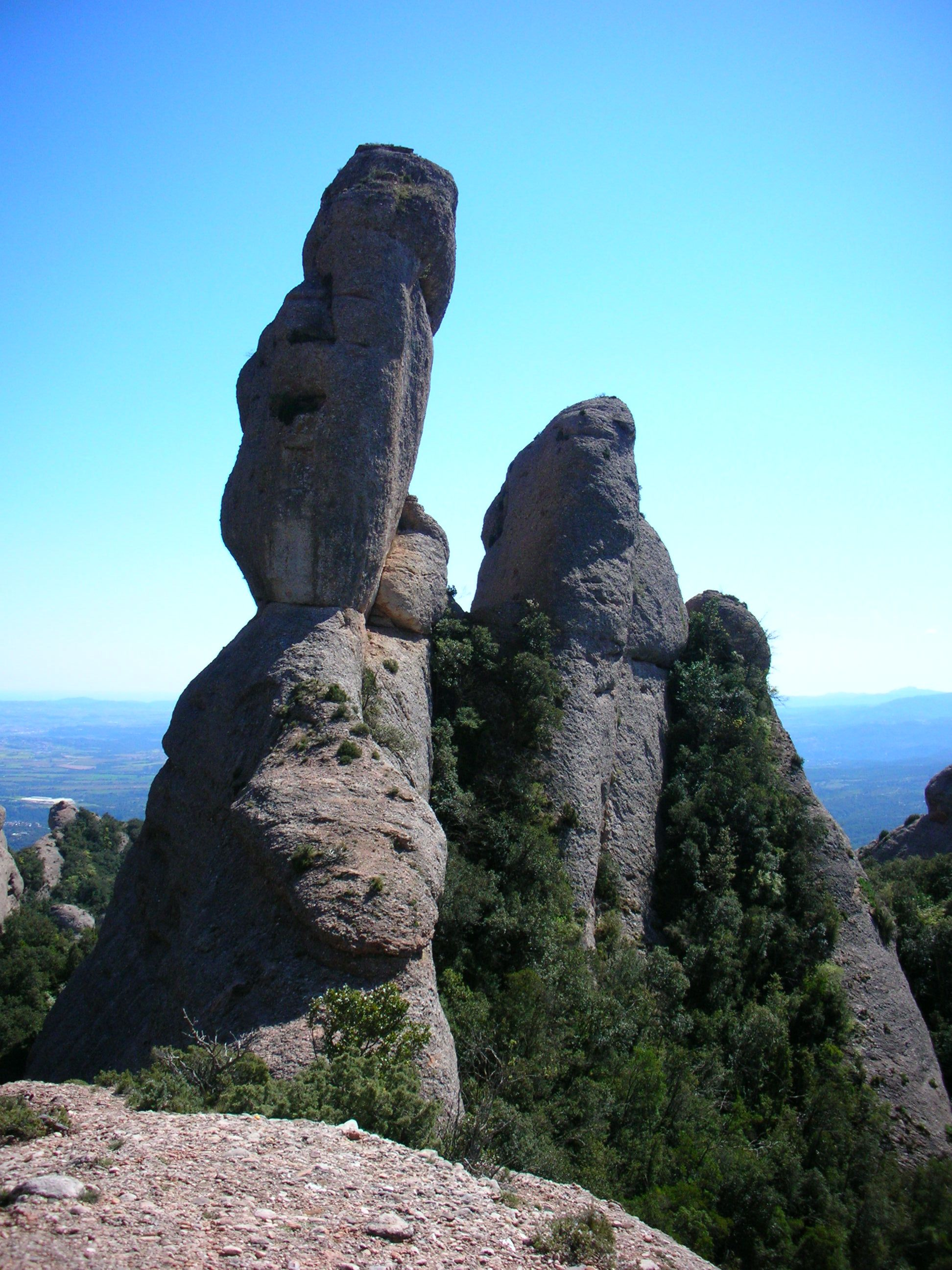 El Cilindre o Cabrit, Montserrat, Catalunya